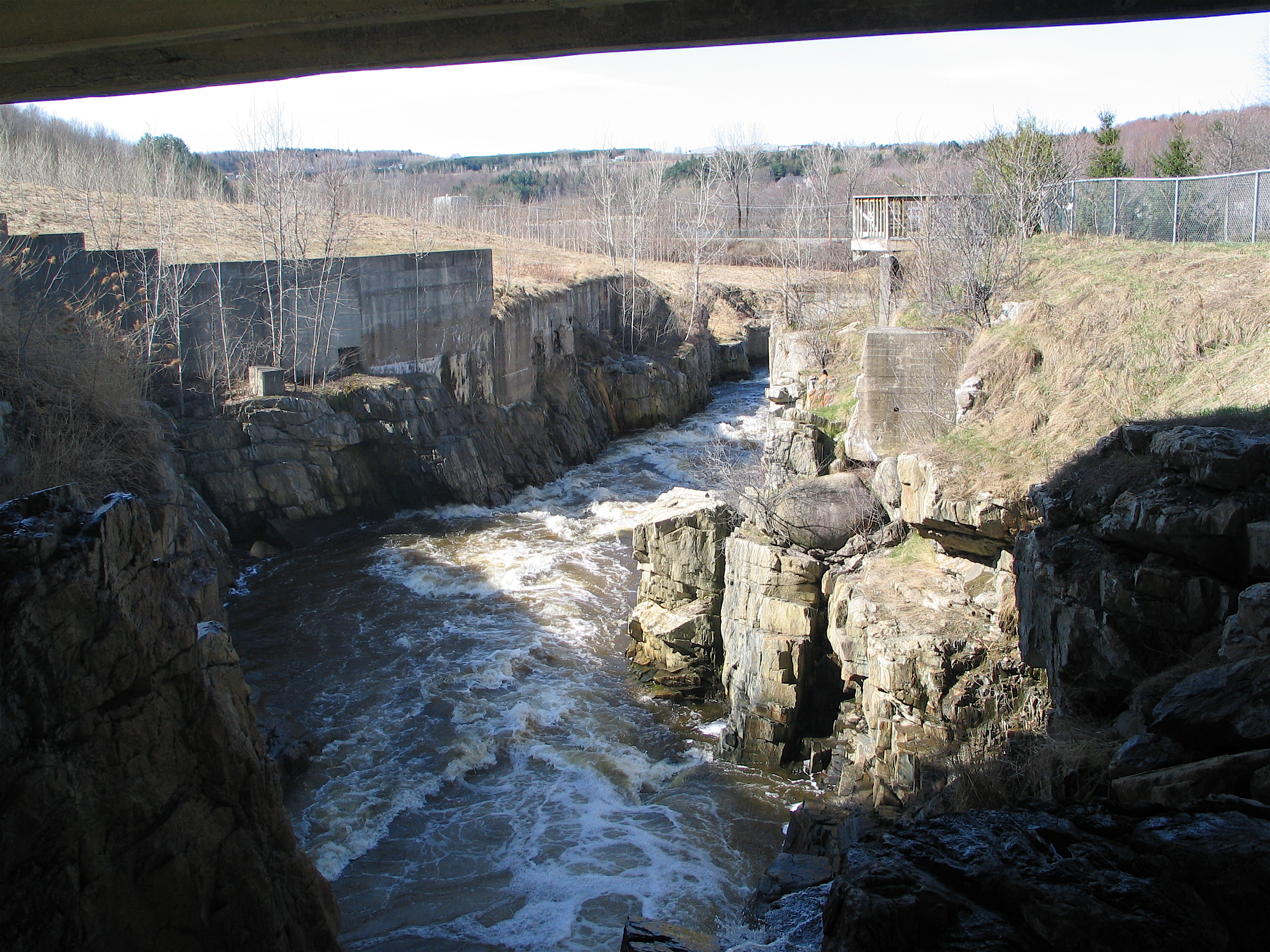 Rivière Watopéka sous le pont de la route 143 (Prise #2)